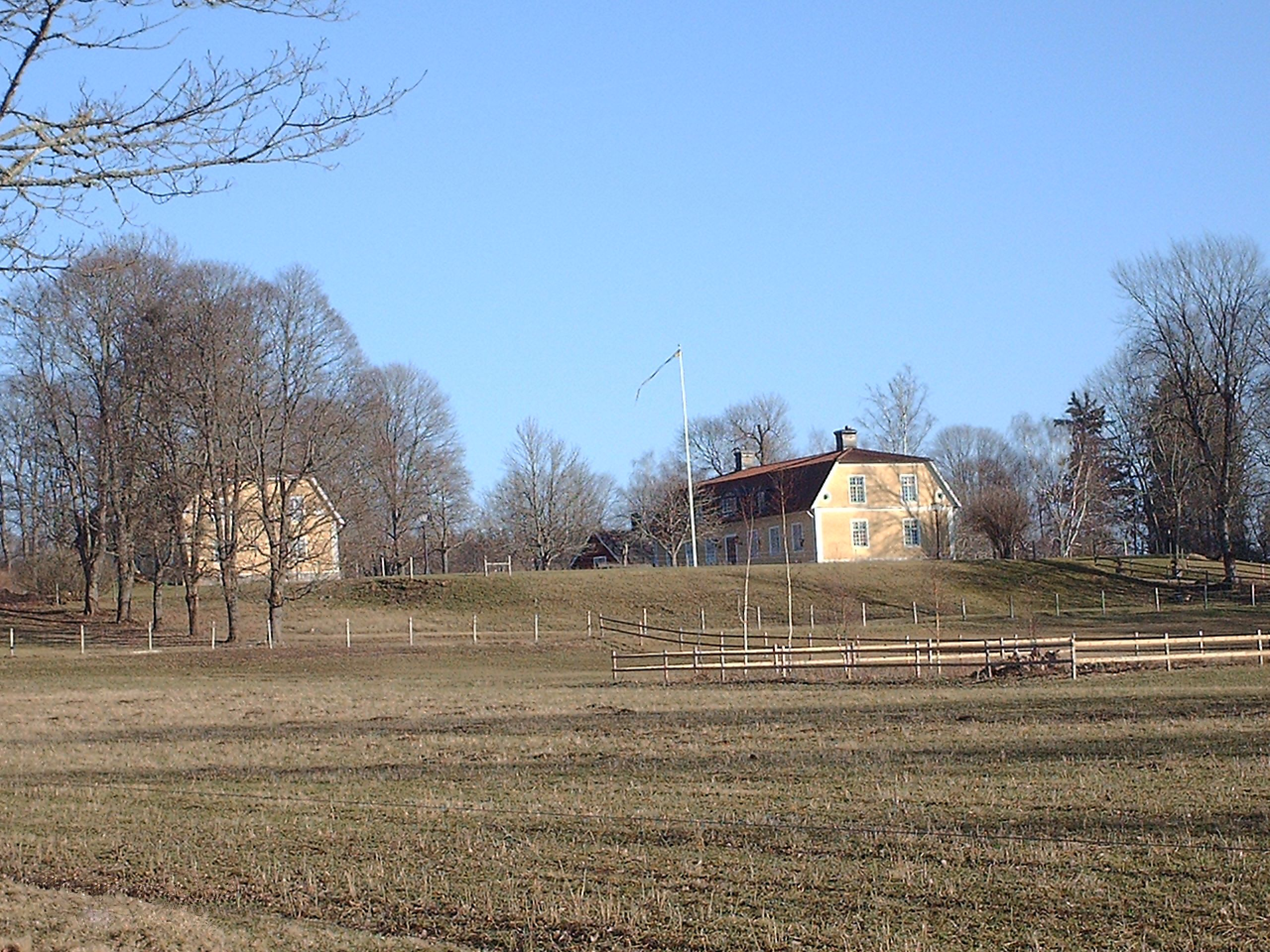 Medevi gård, Östergötland, Sweden.